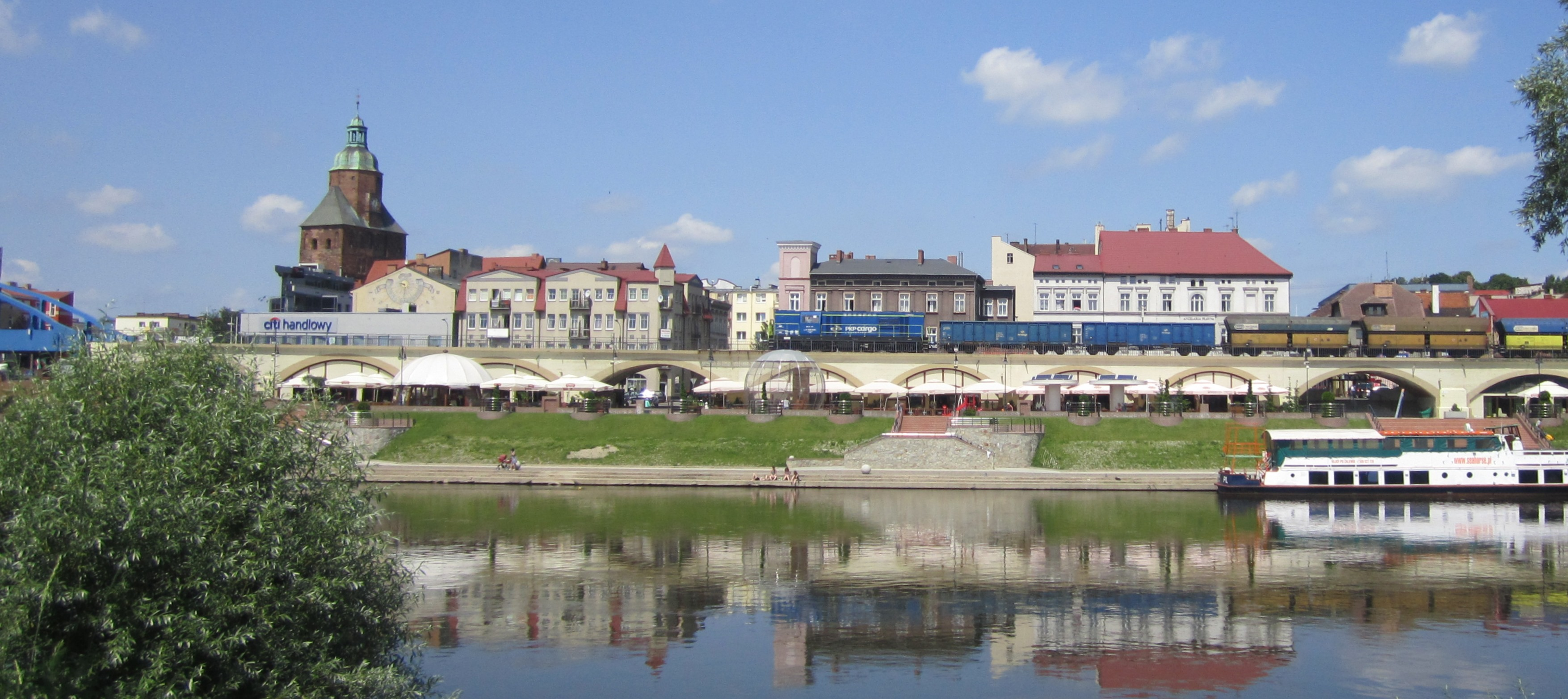 Gorzów Wlkp. estakada kolejowa; najdłuższy zabytek techniki w Polsce